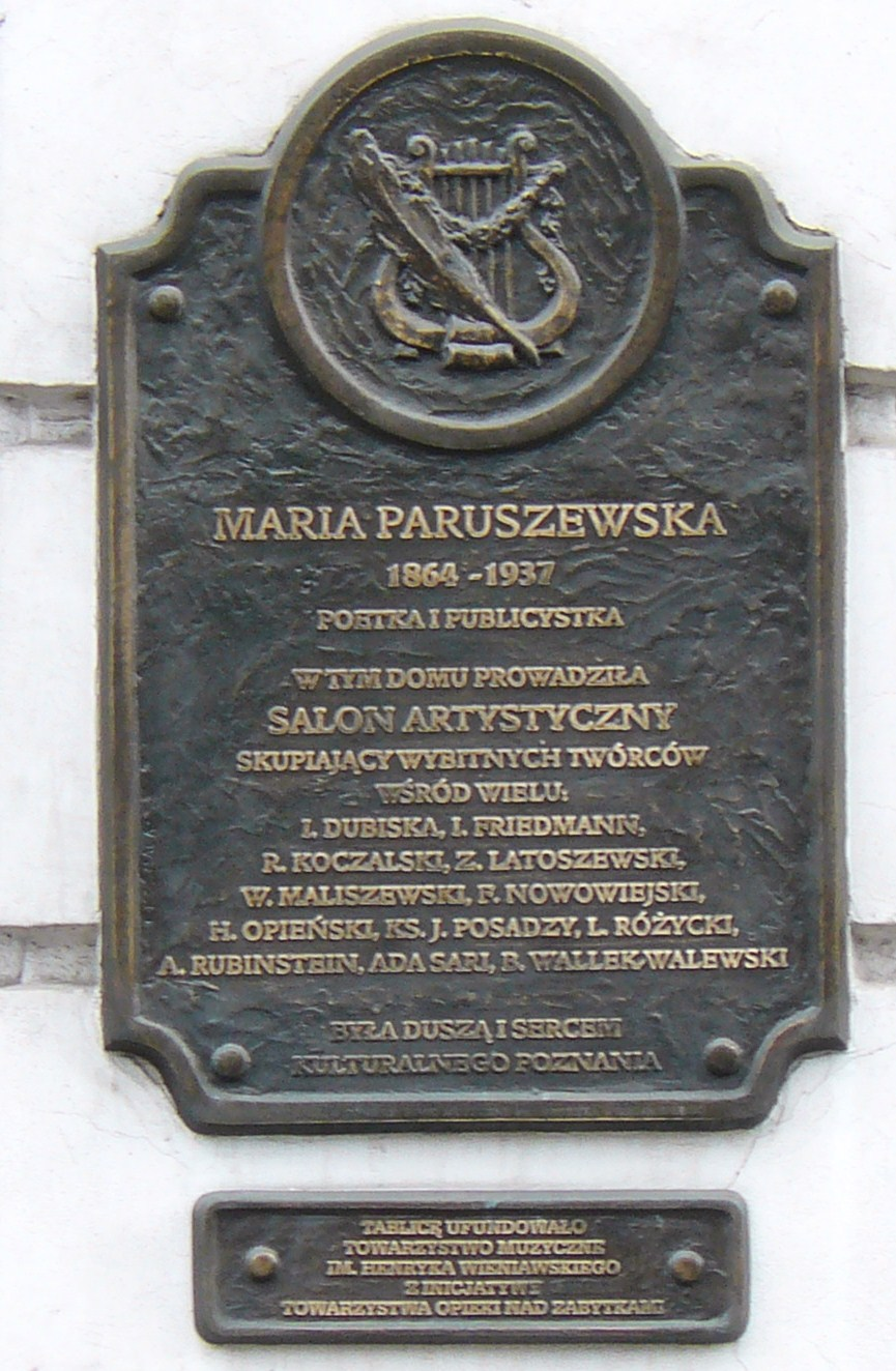 Maria Paruszewska plaque, Poznań, Marcinkowskiego Av.